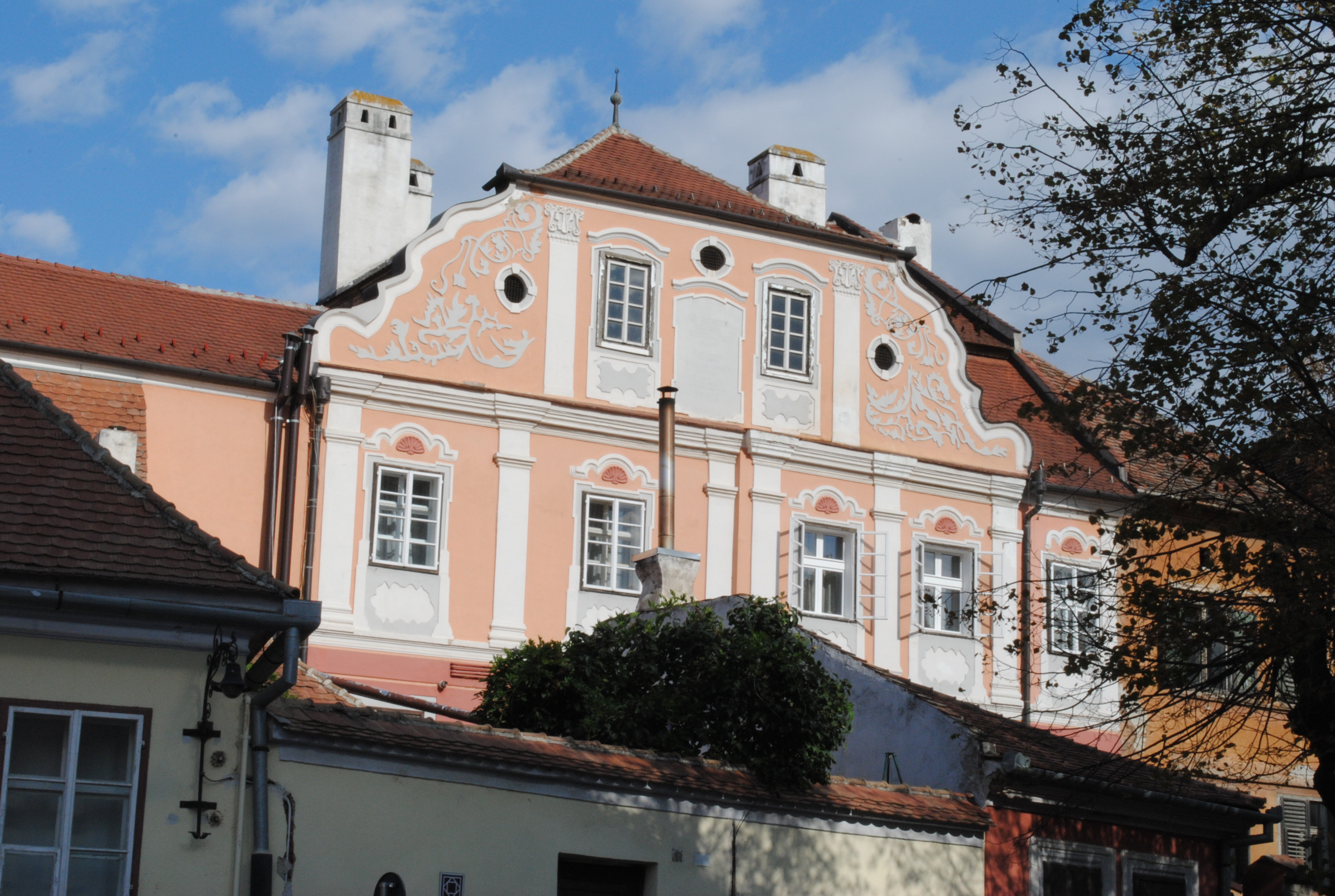 Casă, sec. XV - XVI, sec. XVIII